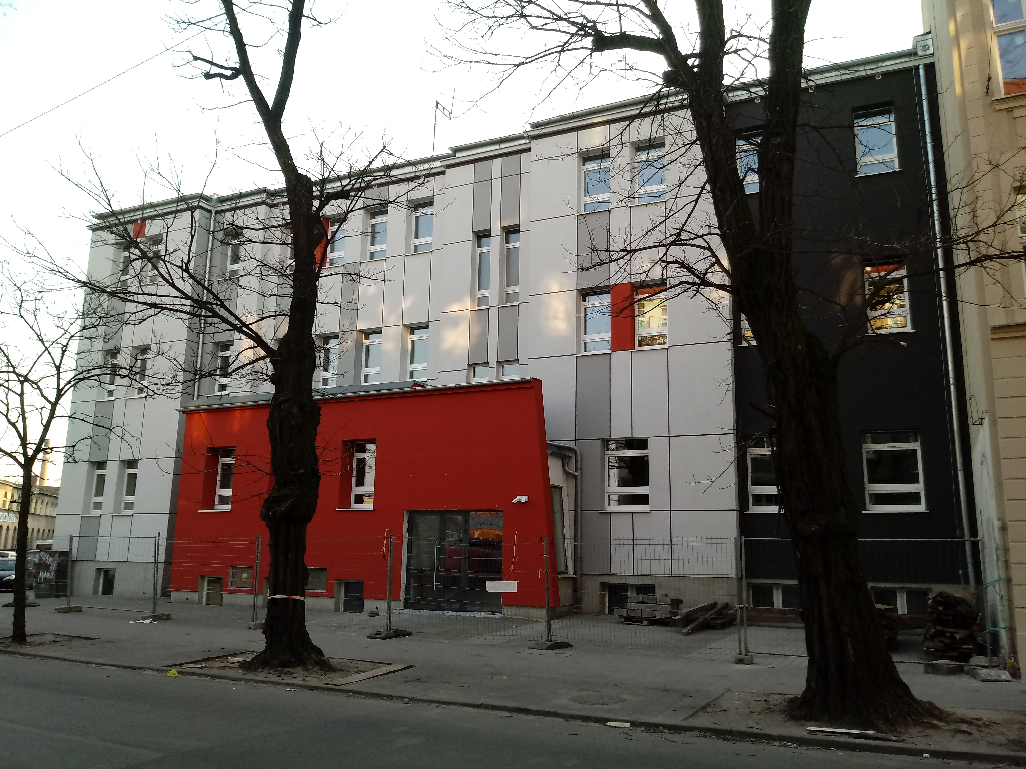 Budynek dawnego Wielkopolskiego Centrum Ortopedii i Chirurgii Urazowej im. Ireneusza Wierzejewskiego, ul. Gąsiorowskich w Poznaniu